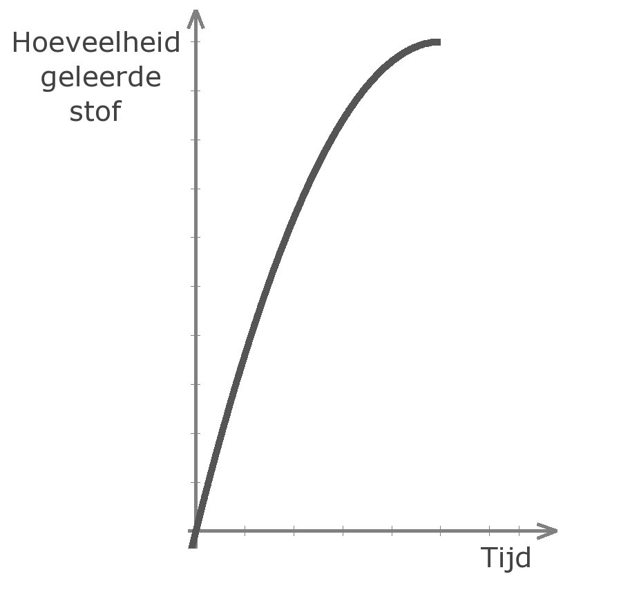 Snel getekend plaatje van een stijle leercurve zoals het begrip tegenwoordig zeer vaak gebruikt wordt